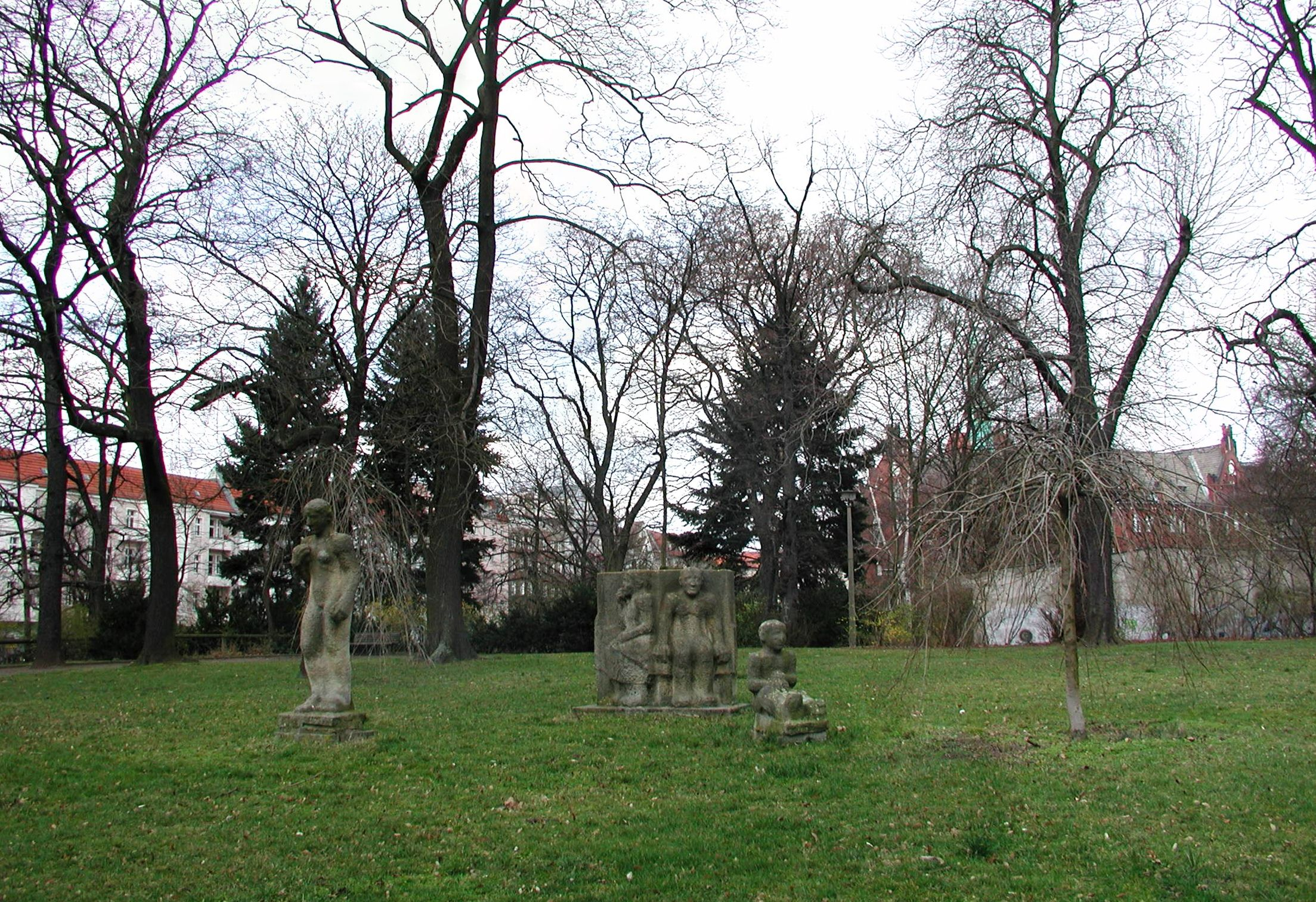 Berlin-Lichtenberg, Möllendorffstraße, Grünanlage